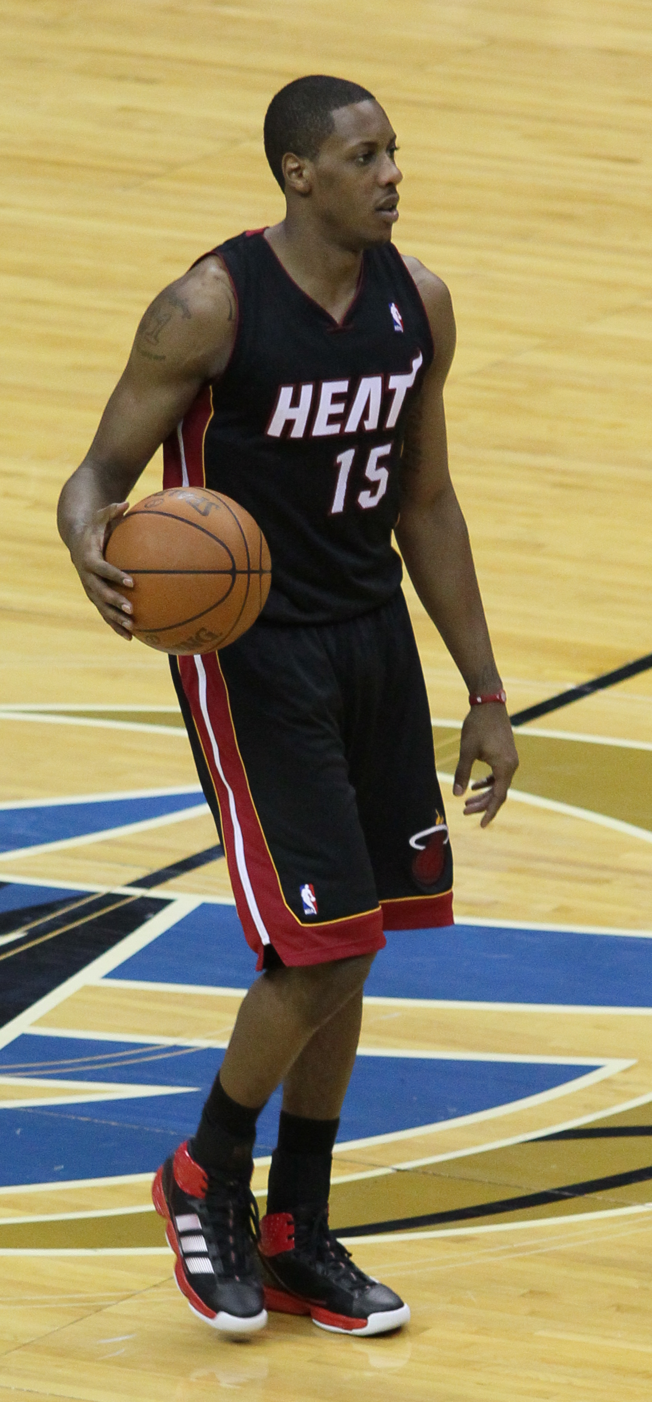 Mario Chalmers w sezonie 2010/2011